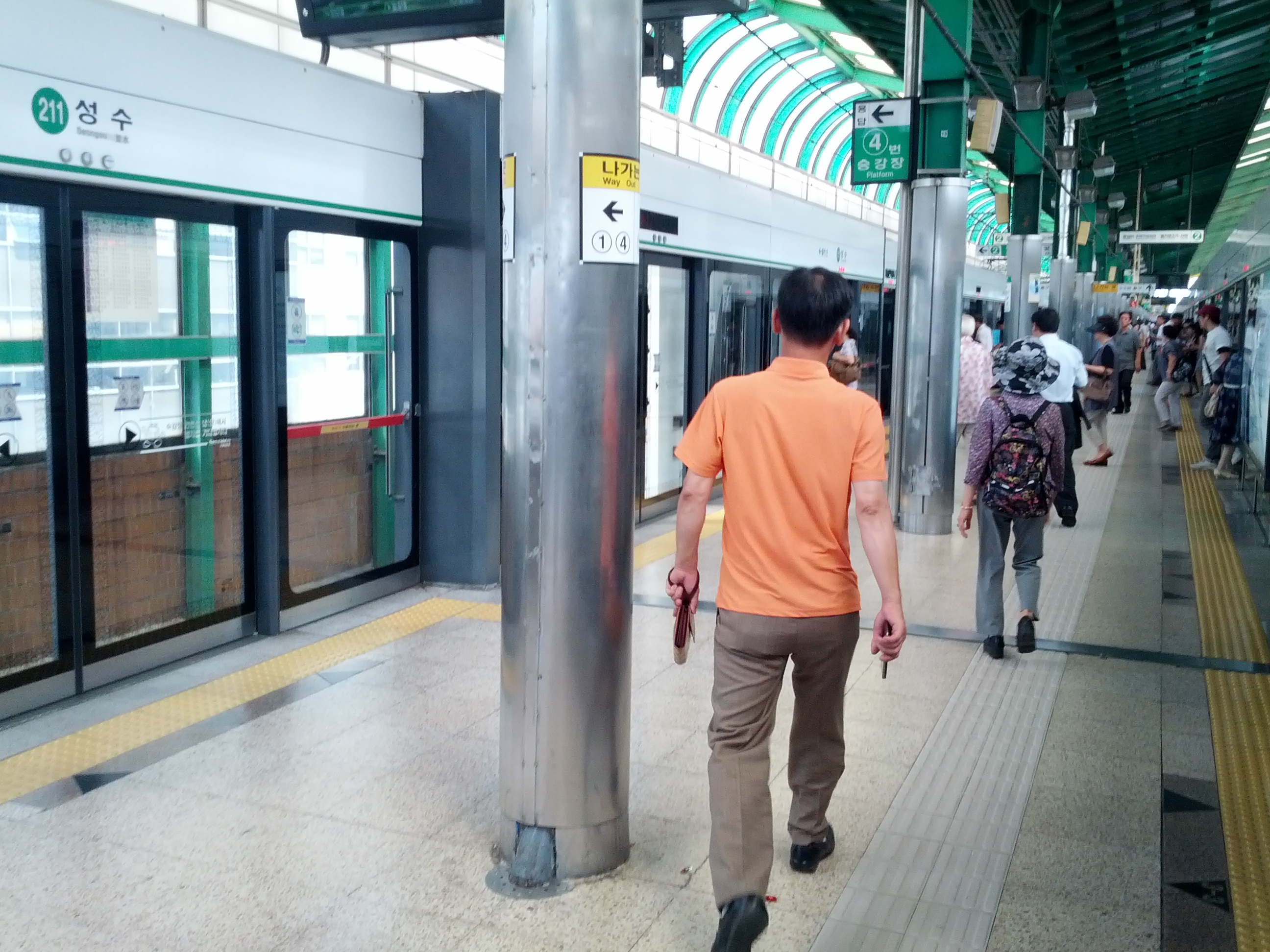 성수역 승강장